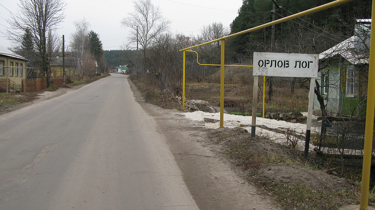 Посёлок Орлов Лог, Семилукский район, Воронежская область